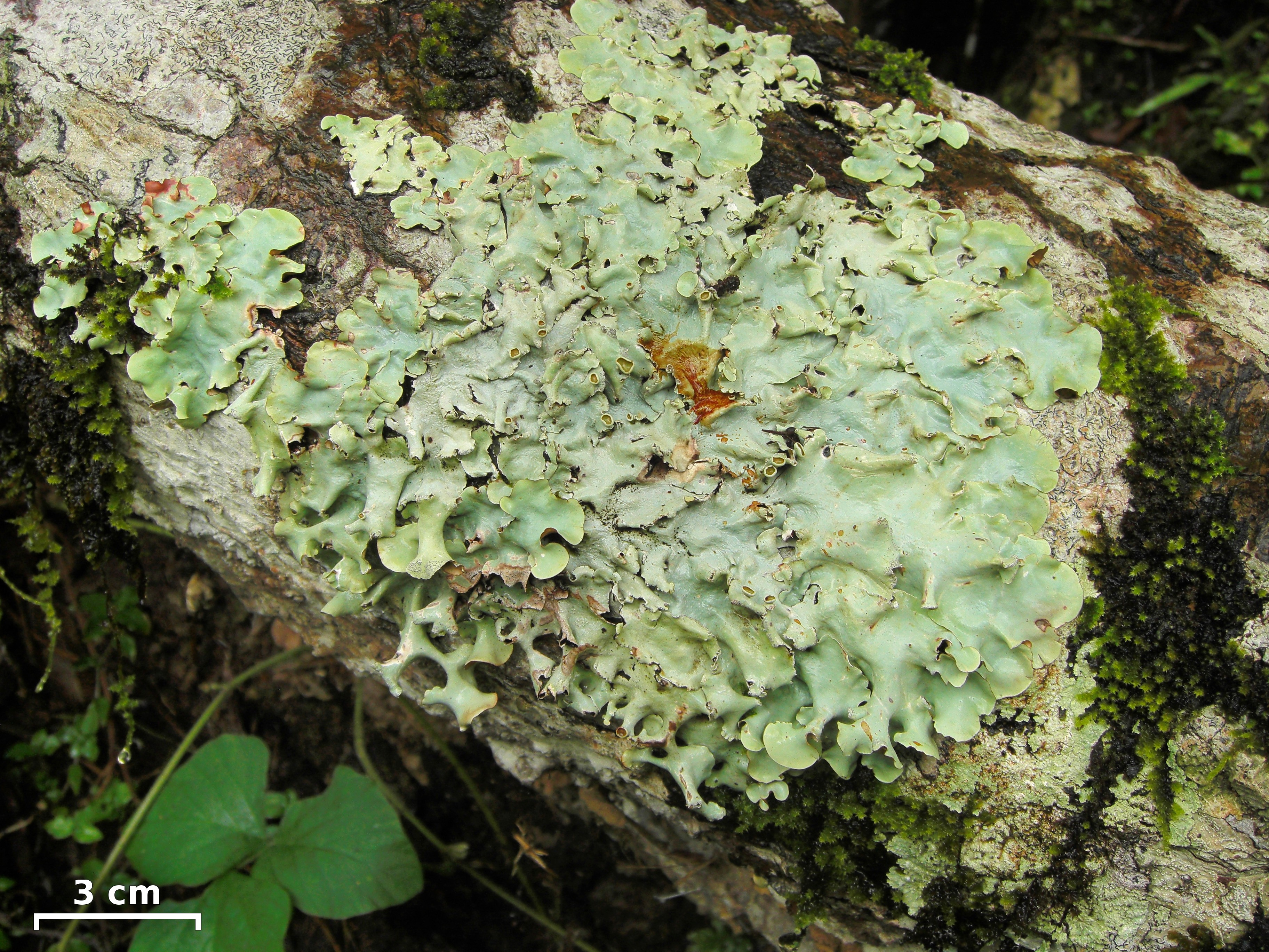 Amazon, Peru, 20130118